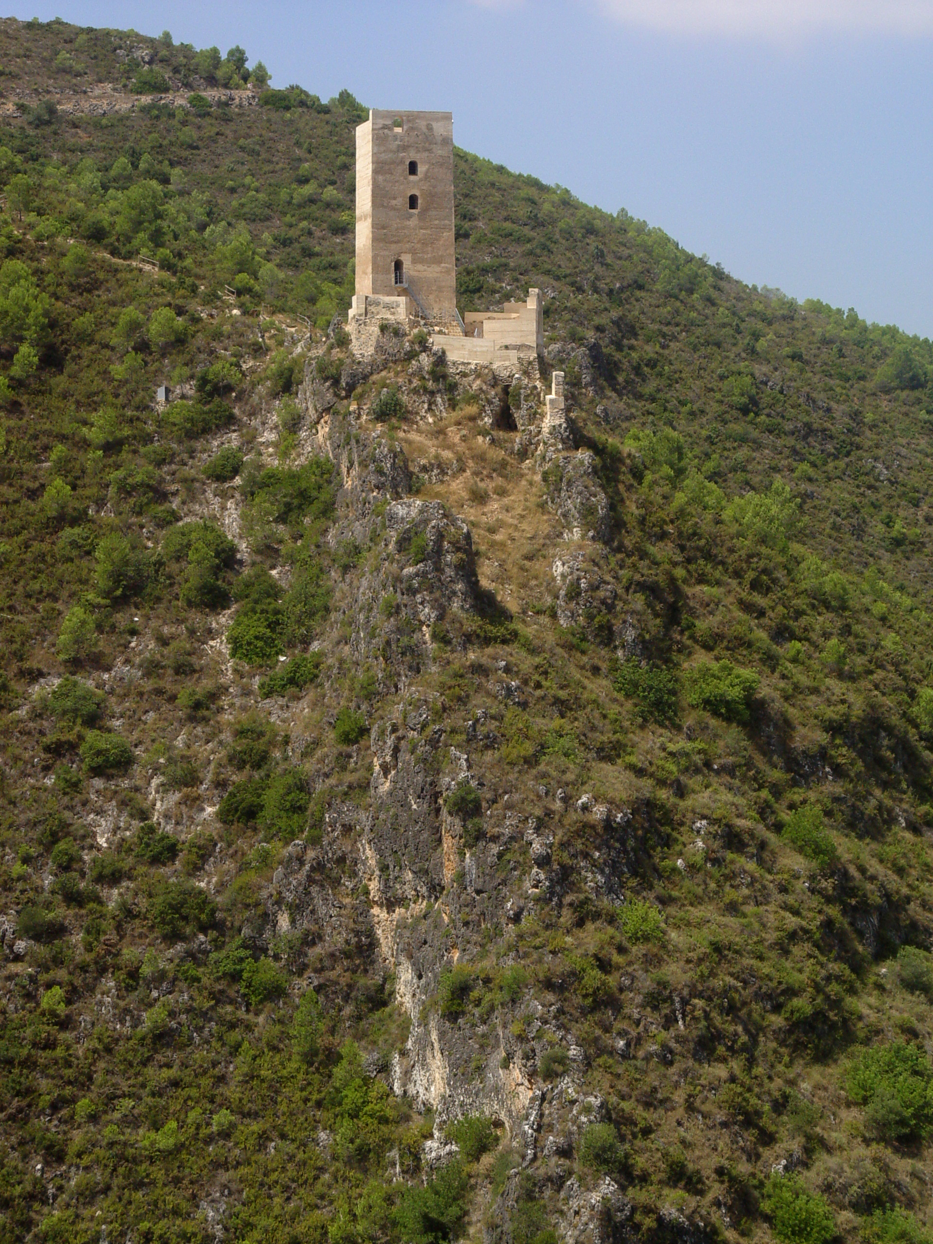 Vista de la cara este del castillo de Carrícola